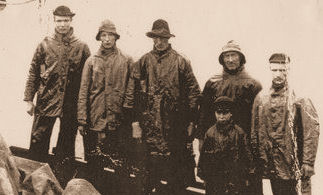 Bemanning van de Engelse schoener Doris die in 1907 strandde bij Vlissingen